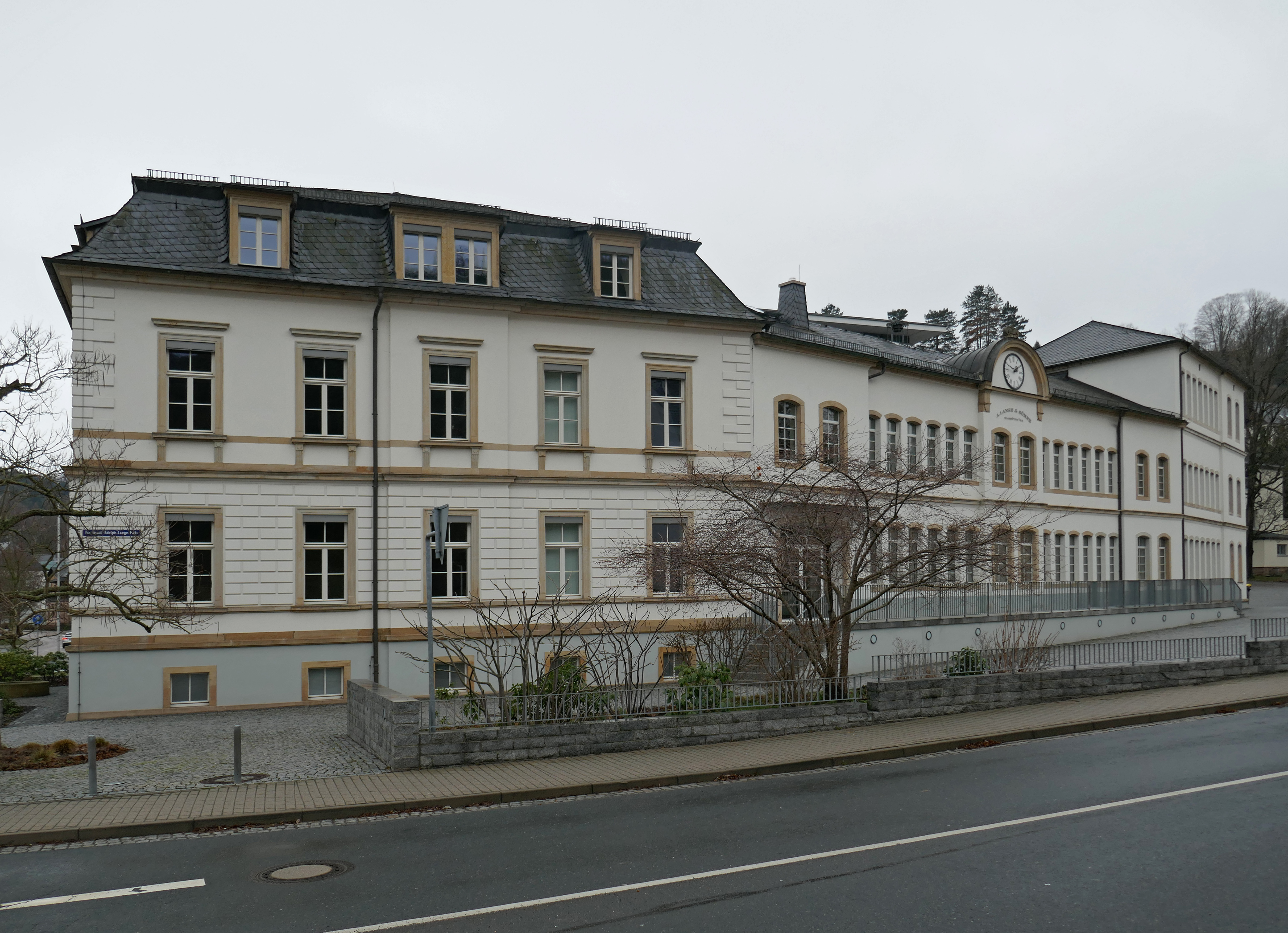 A. Lange & Söhne-Stammhaus in Glashütte im Osterzgebirge, Sachsen.